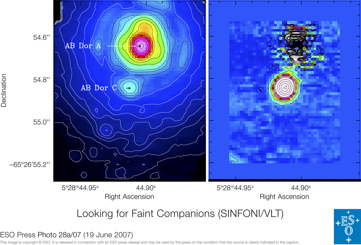 Das System AB Doradus A und C vor Anwendung der neuen Beobachtungsmethode (links) und danach.